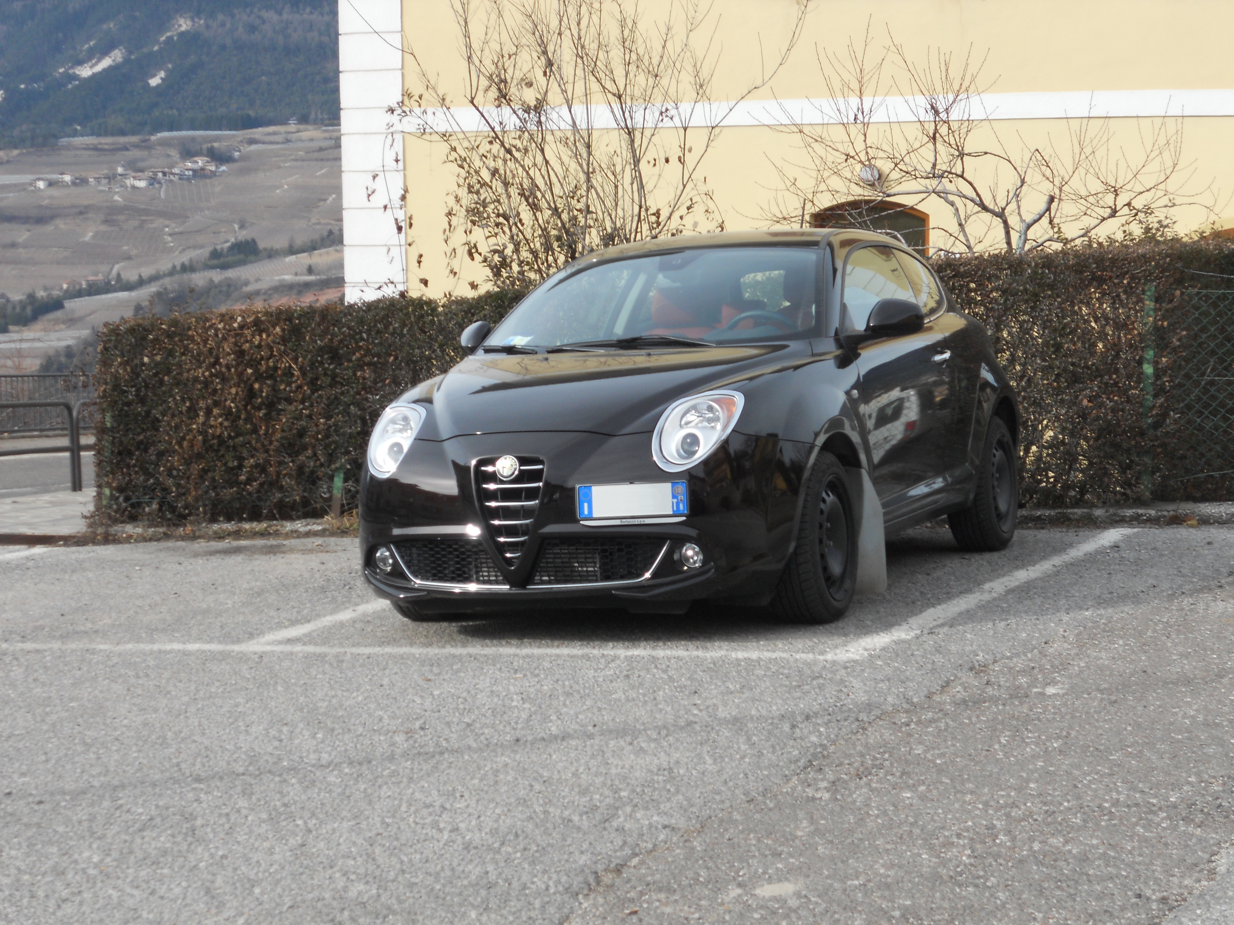 Una Alfa Romeo Mito in montagna con parafanghi per neve